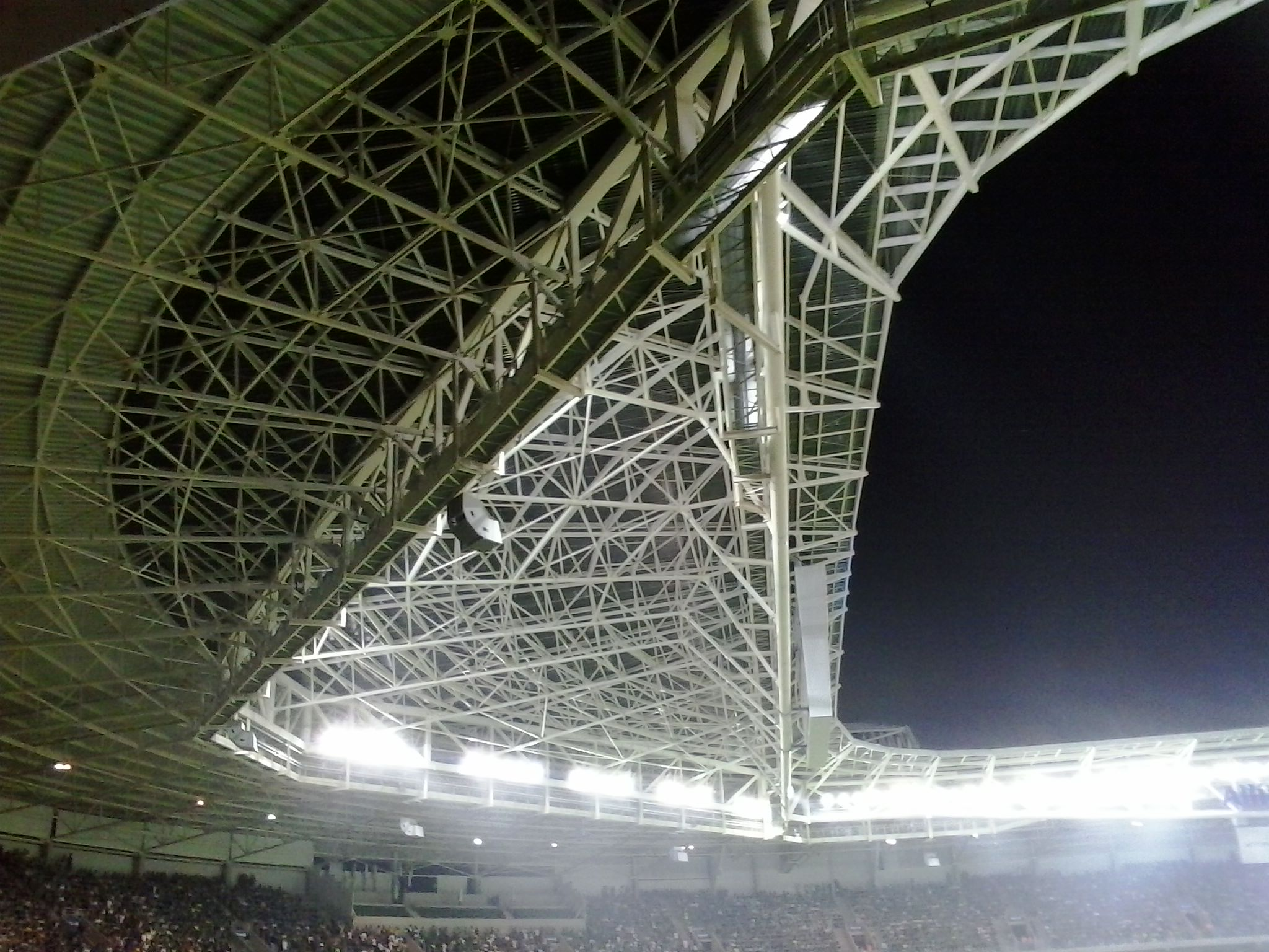 Detalhe da Cobertura do Allianz Parque